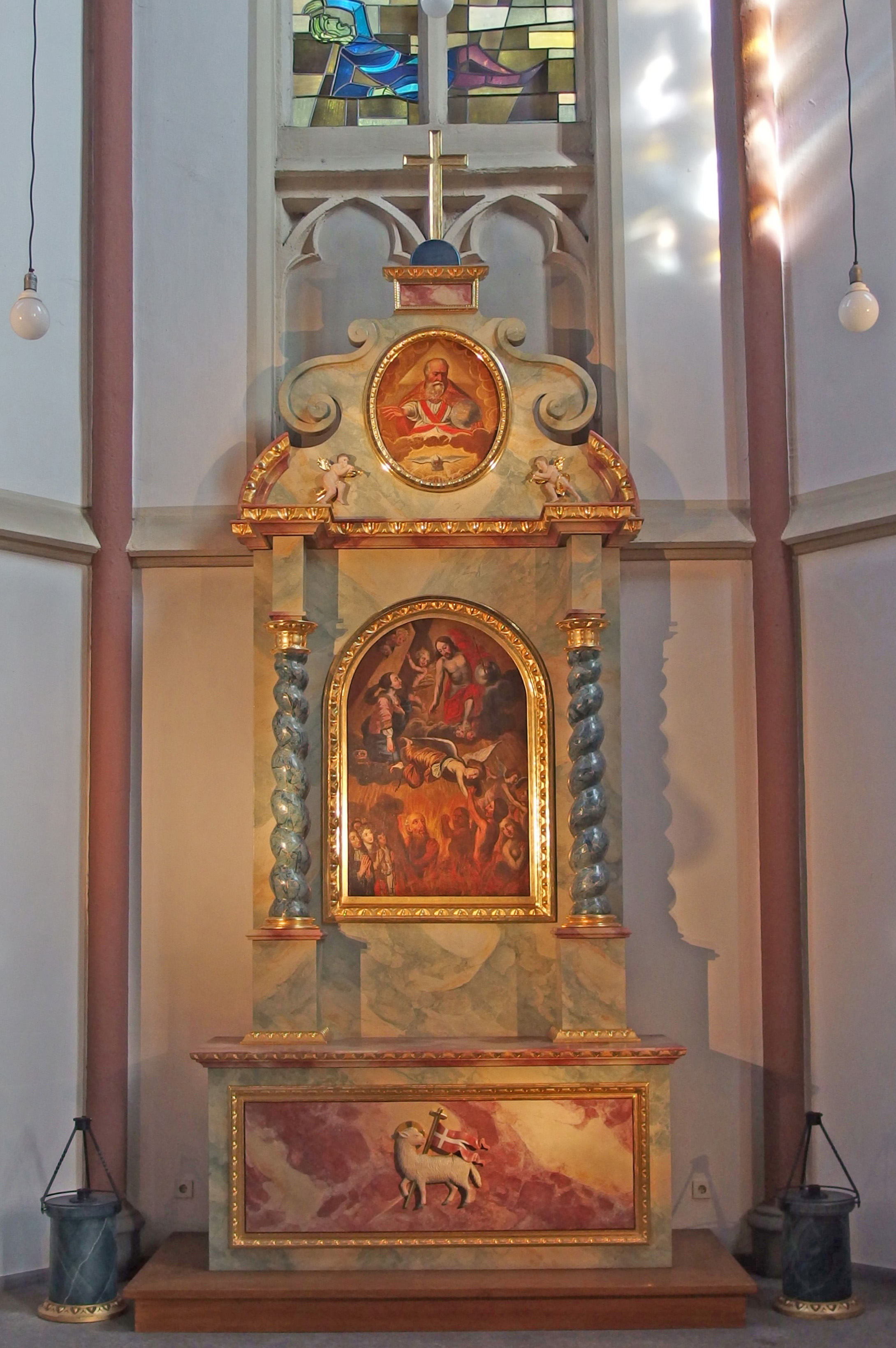 St. Andreas Korschenbroich - Barockaltar aus dem 17. Jh.